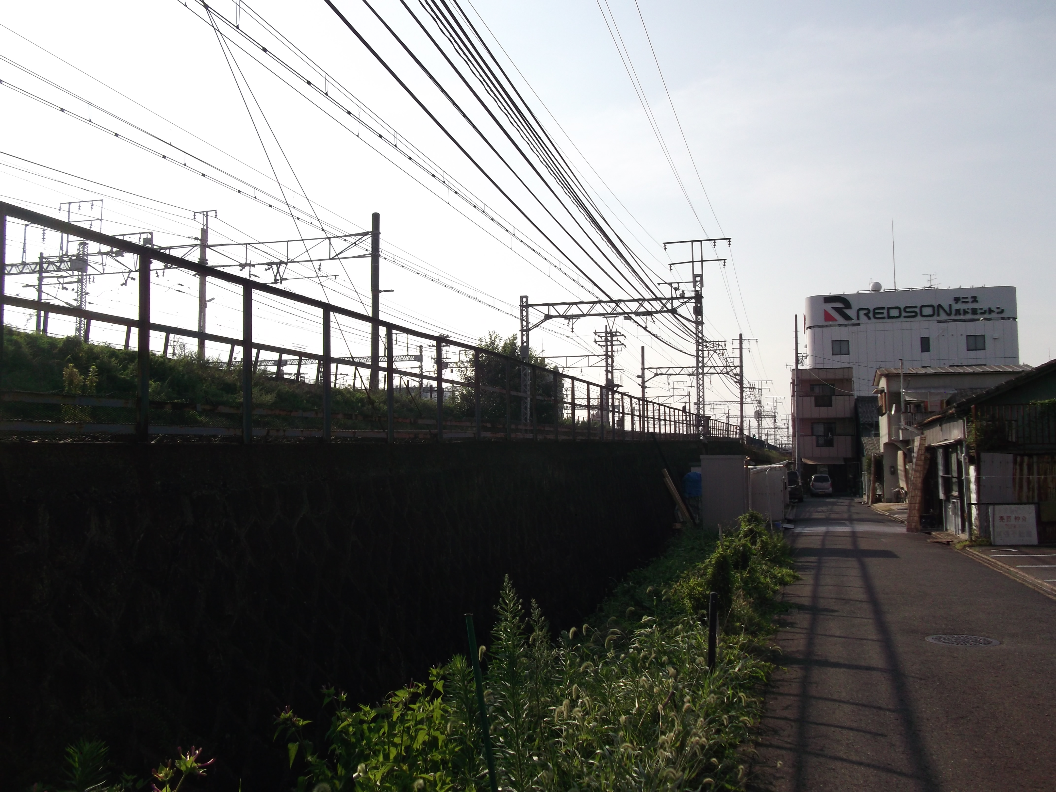 名古屋市西区桃ノ木町の現況（道路より左側）